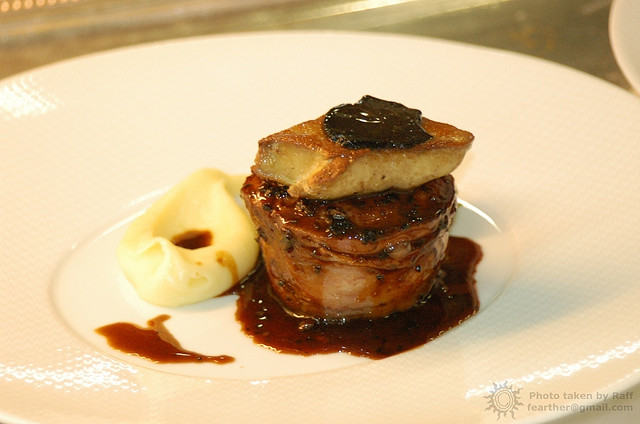 Rognon, foie gras et truffe noire avec une purée de pommes de terre